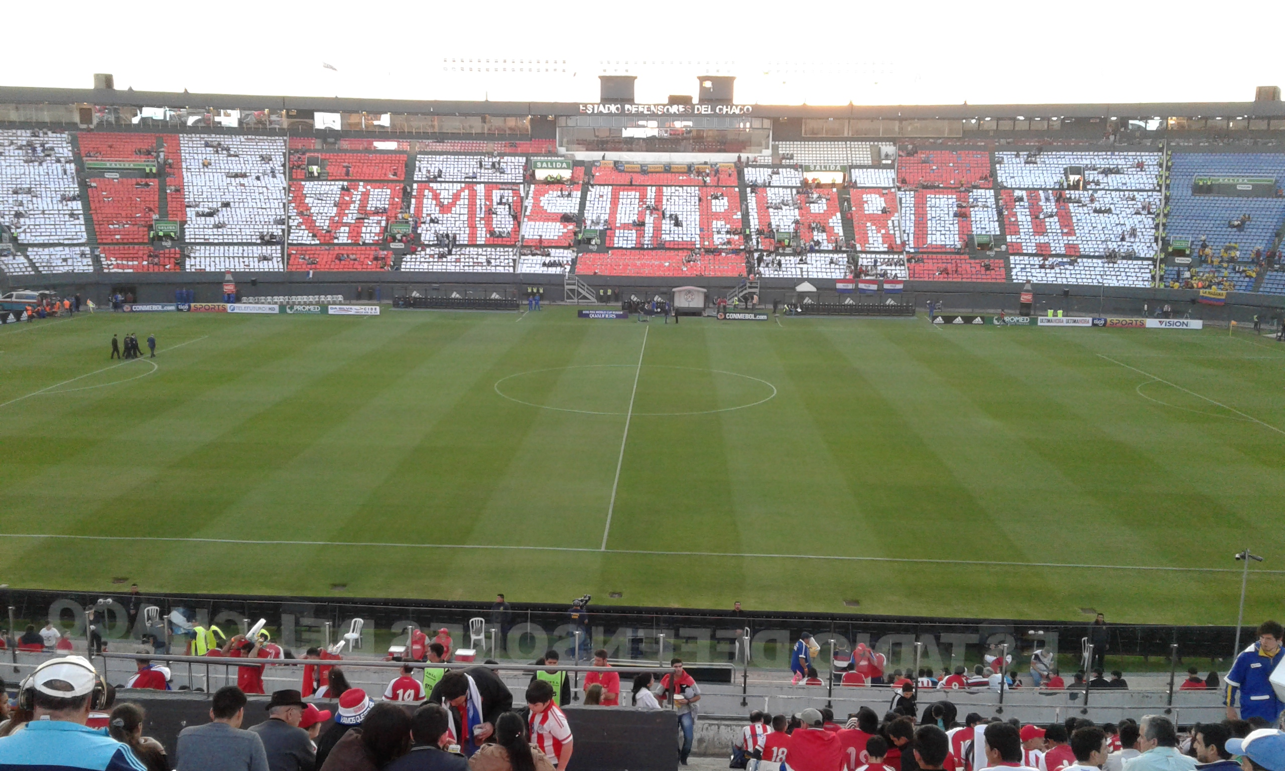 Imagen captada a dos horas del comienzo del encuentro entre las selecciones de Paraguay y Colombia, por la fecha 9 de la clasificatoria sudamericana al mundial 2018. El juego se disputó en el estadio Defensores del Chaco de la ciudad de Asunción, Paraguay, el día jueves 6 de octubre de 2016, a partir de las 20:30 hs. (local). Se observa al fondo el sector preferencial y más abajo parte del sector Vip.